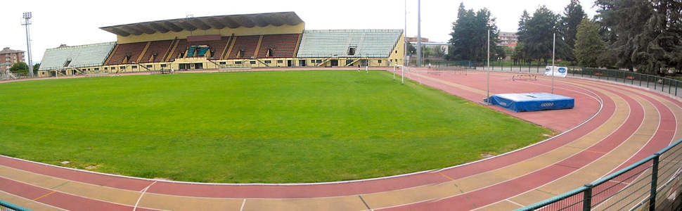 Immagine scannerizzata da una foto dello Stadio Lamarmora di Biella.